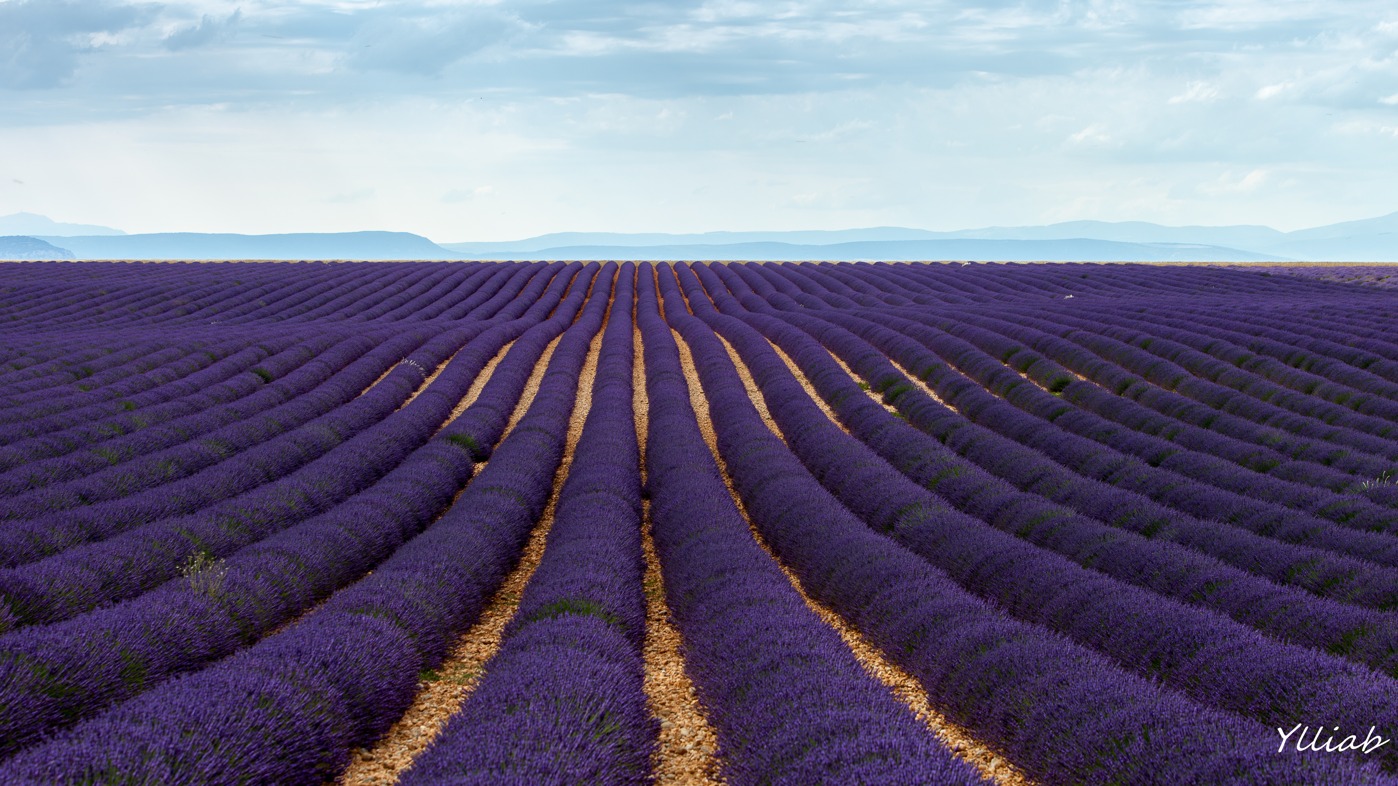 Plateau de Valensole, champ de lavande.